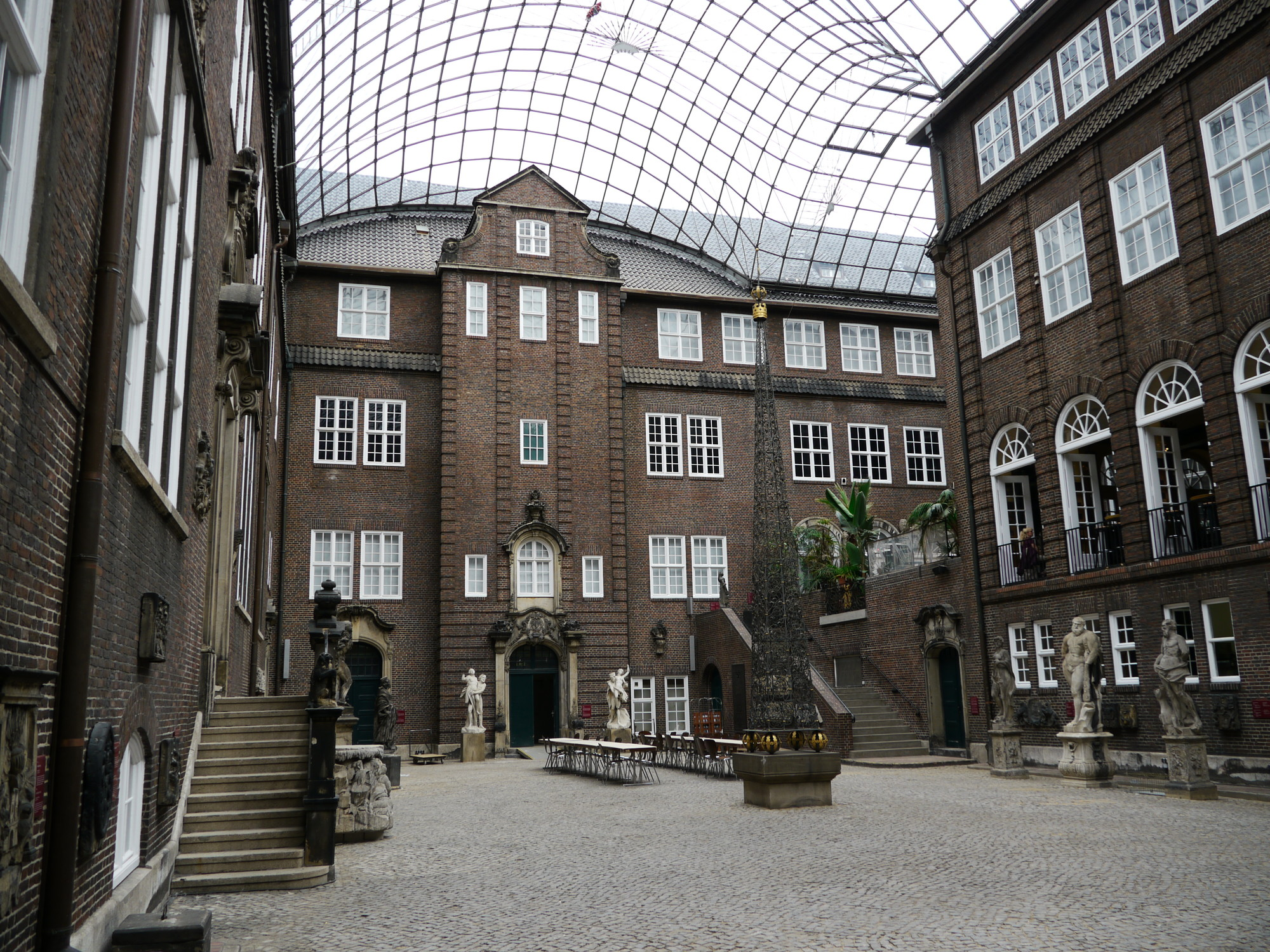 Innenhof des Hamburgmuseums This is a photograph of an architectural monument.